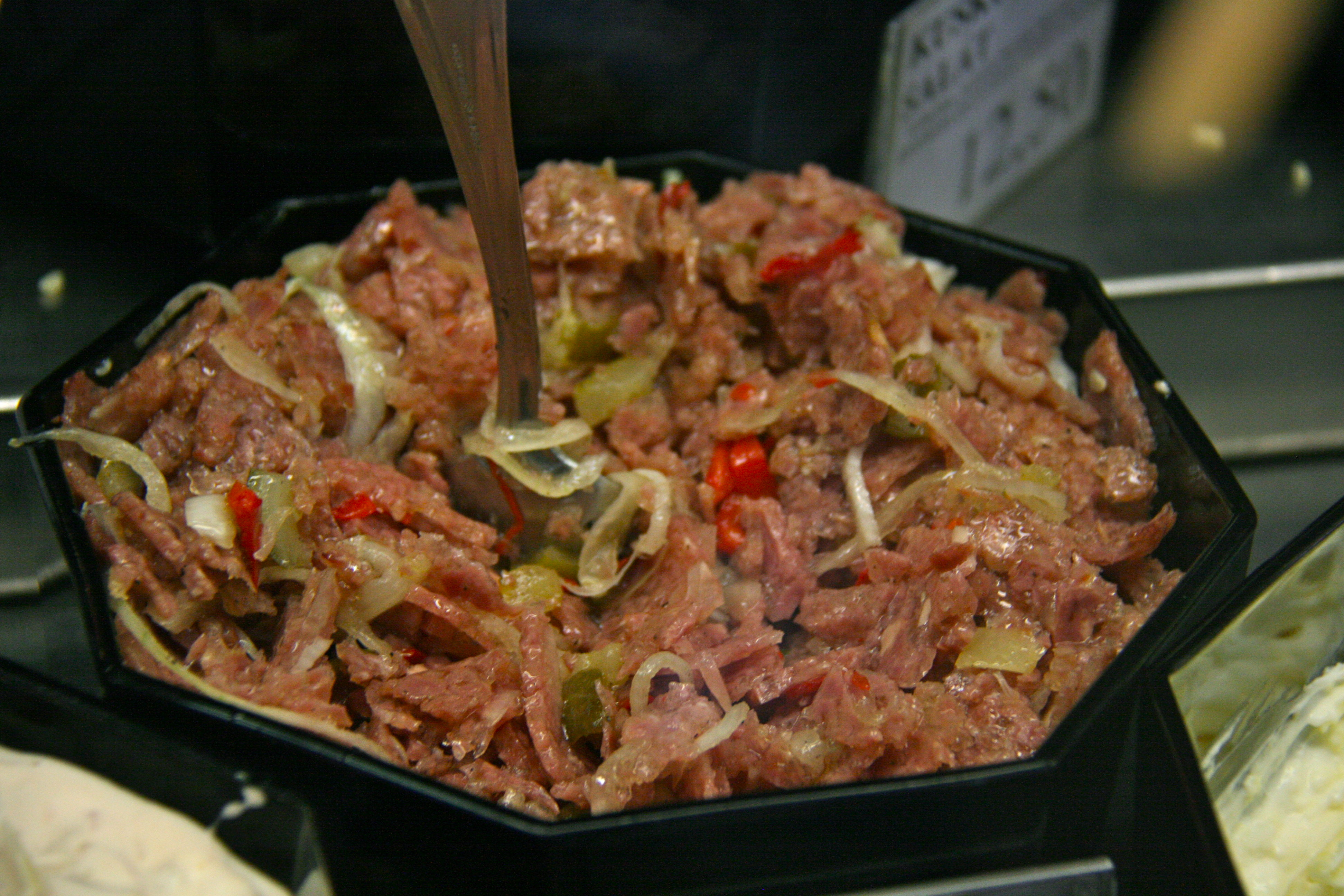 volska tlama talmasalat